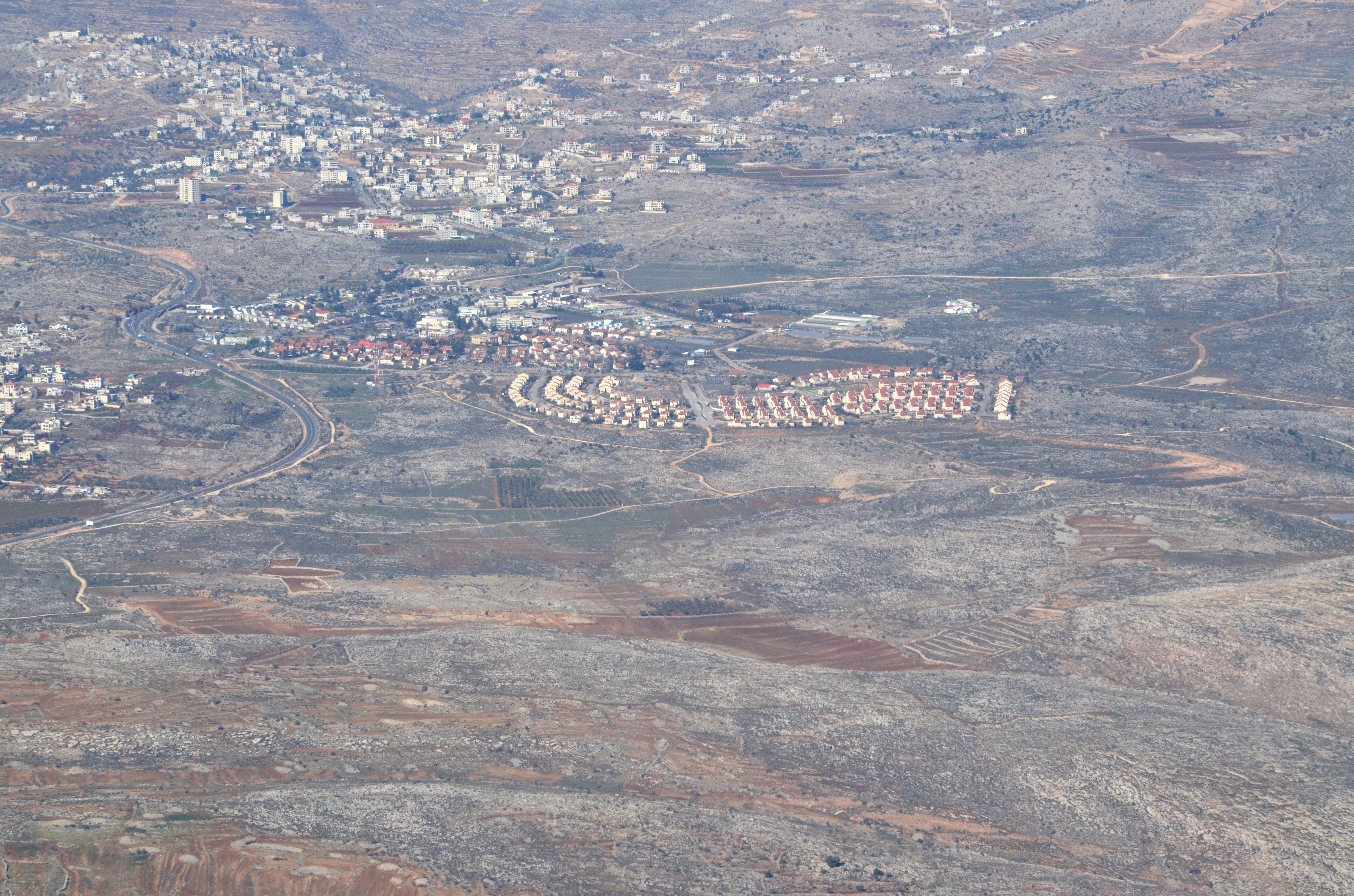 הישוב עפרה בחבל בנימין